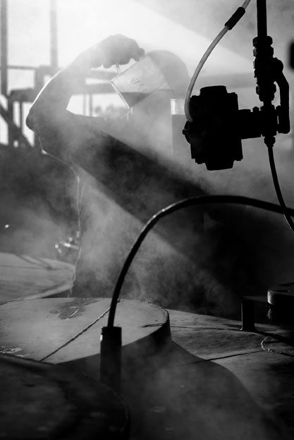 Savanna La Réunion pré-fermenteur cuve